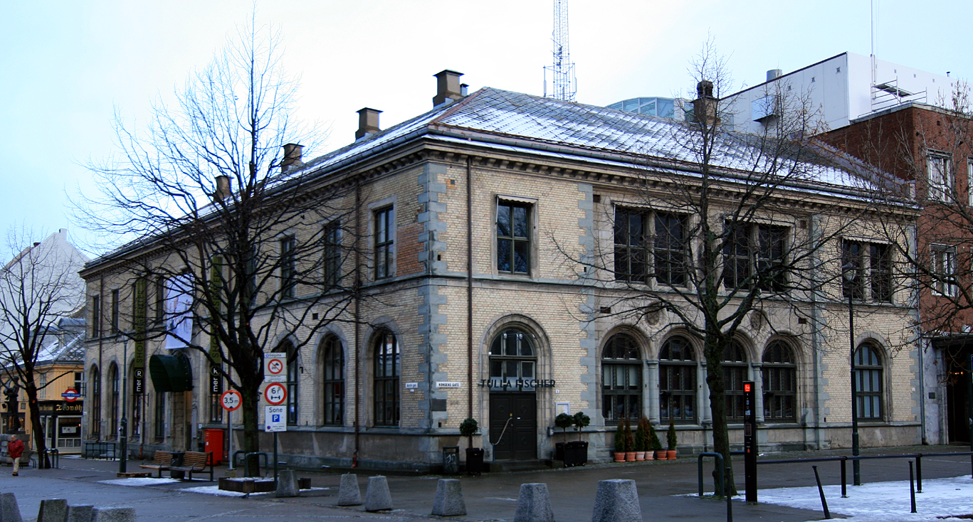 Mercursenteret, Trondheim. Tidligere børs, posthus og telegrafstasjon. Bygd 1863. Arkitekter: Heinrich Ernst Schirmer og Wilhelm von Hanno.